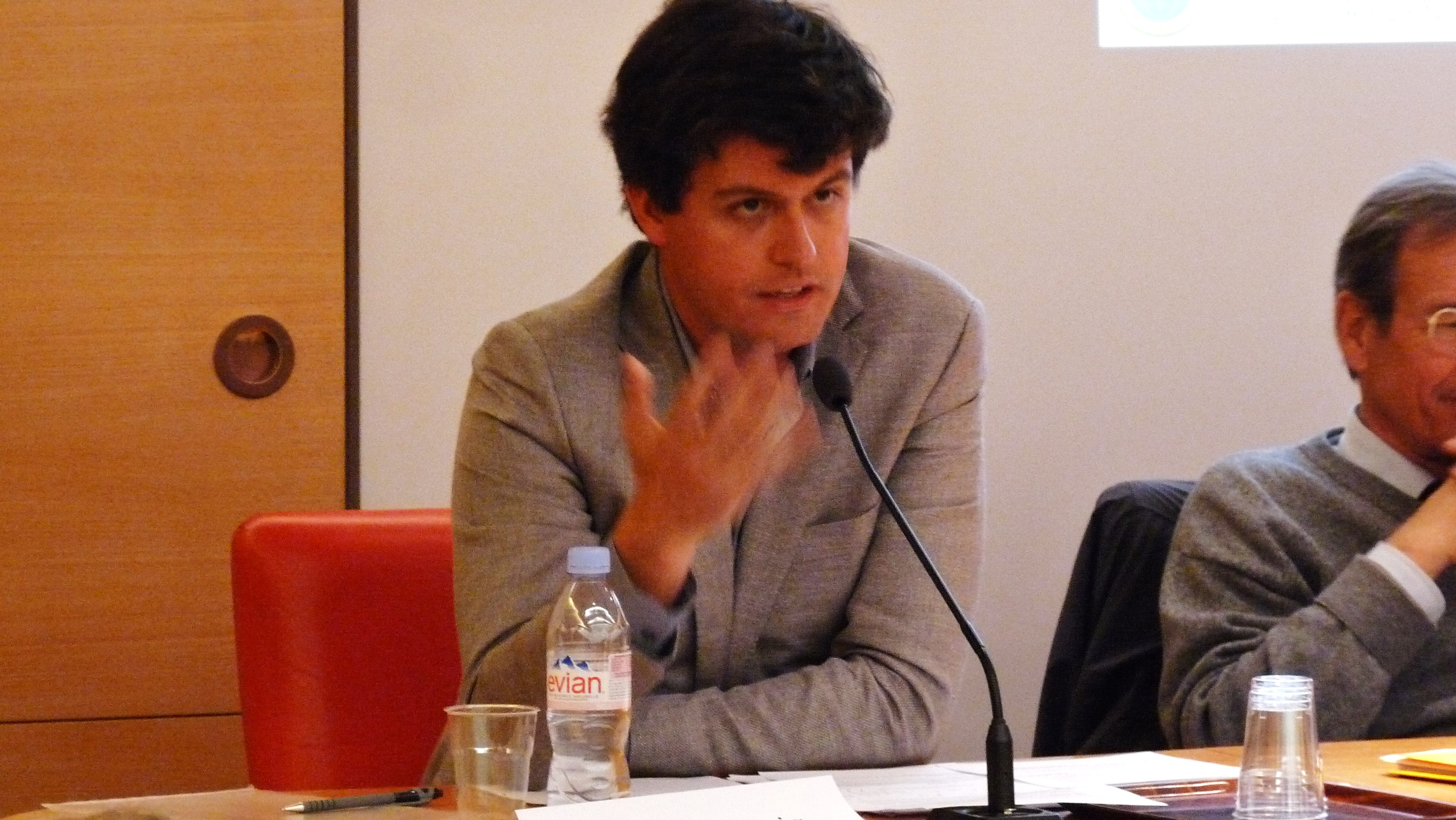 Gaspard Koenig lors d'un colloque sur le revenu de base au Sénat - 19 mai 2015